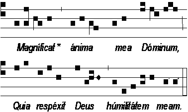 Antienne du "Magnificat" pour le Lundi